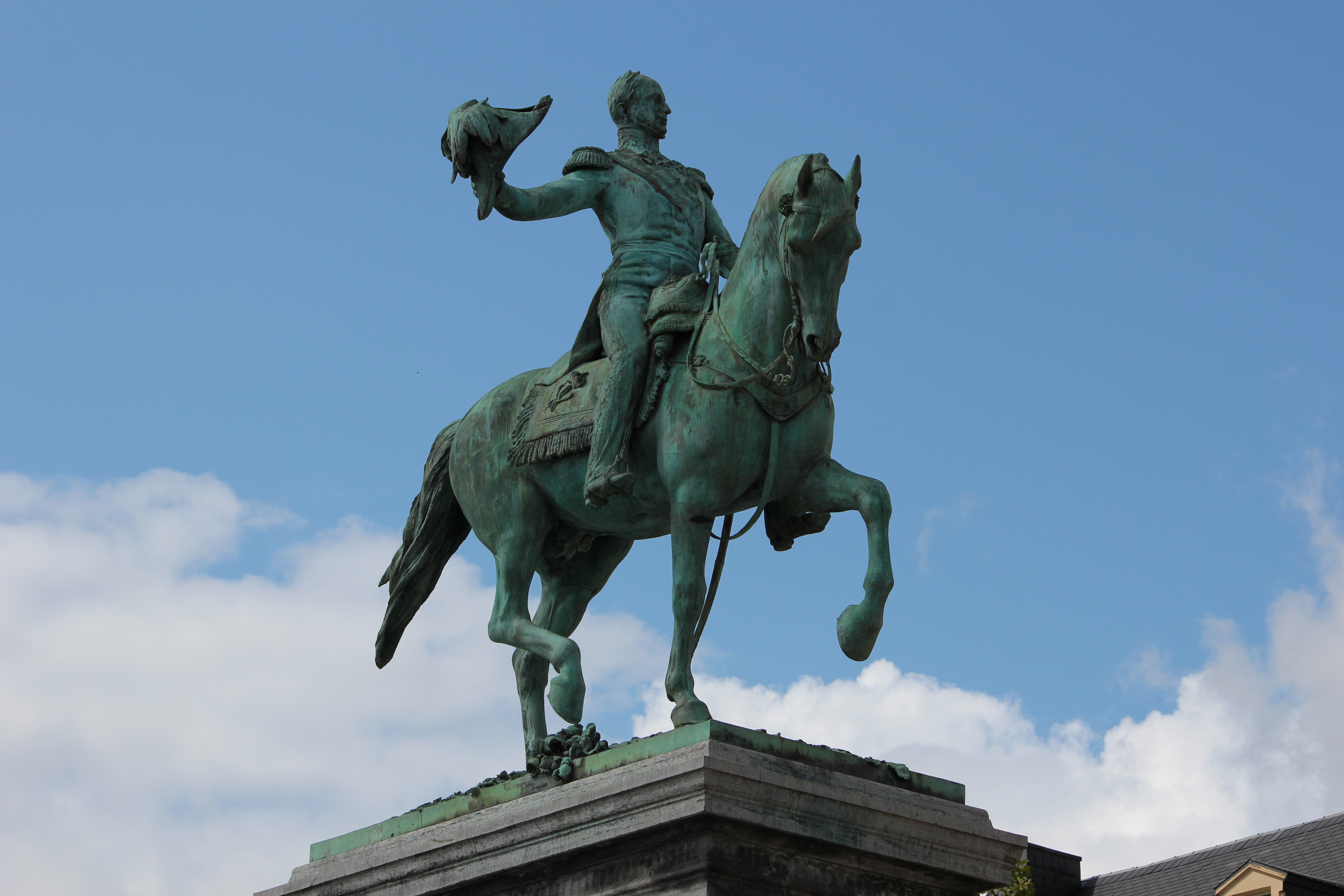 Ruiterstandbeeld van koning Willem II Luxemburg